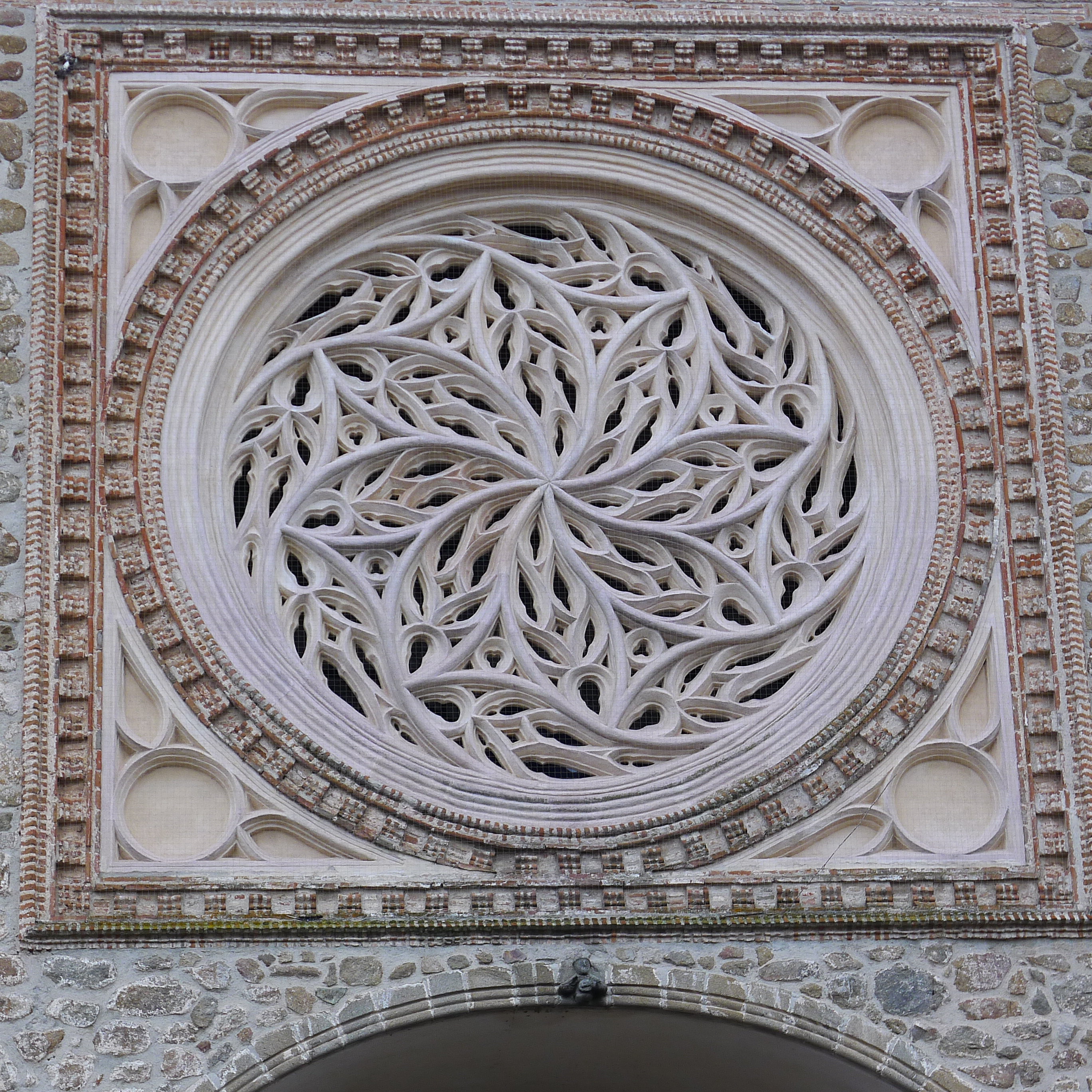 Rosetón gótico de la puerta principal. El comienzo del edificio, siglo XIII.